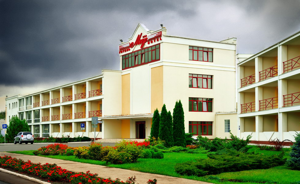 Гостиница "Мир"